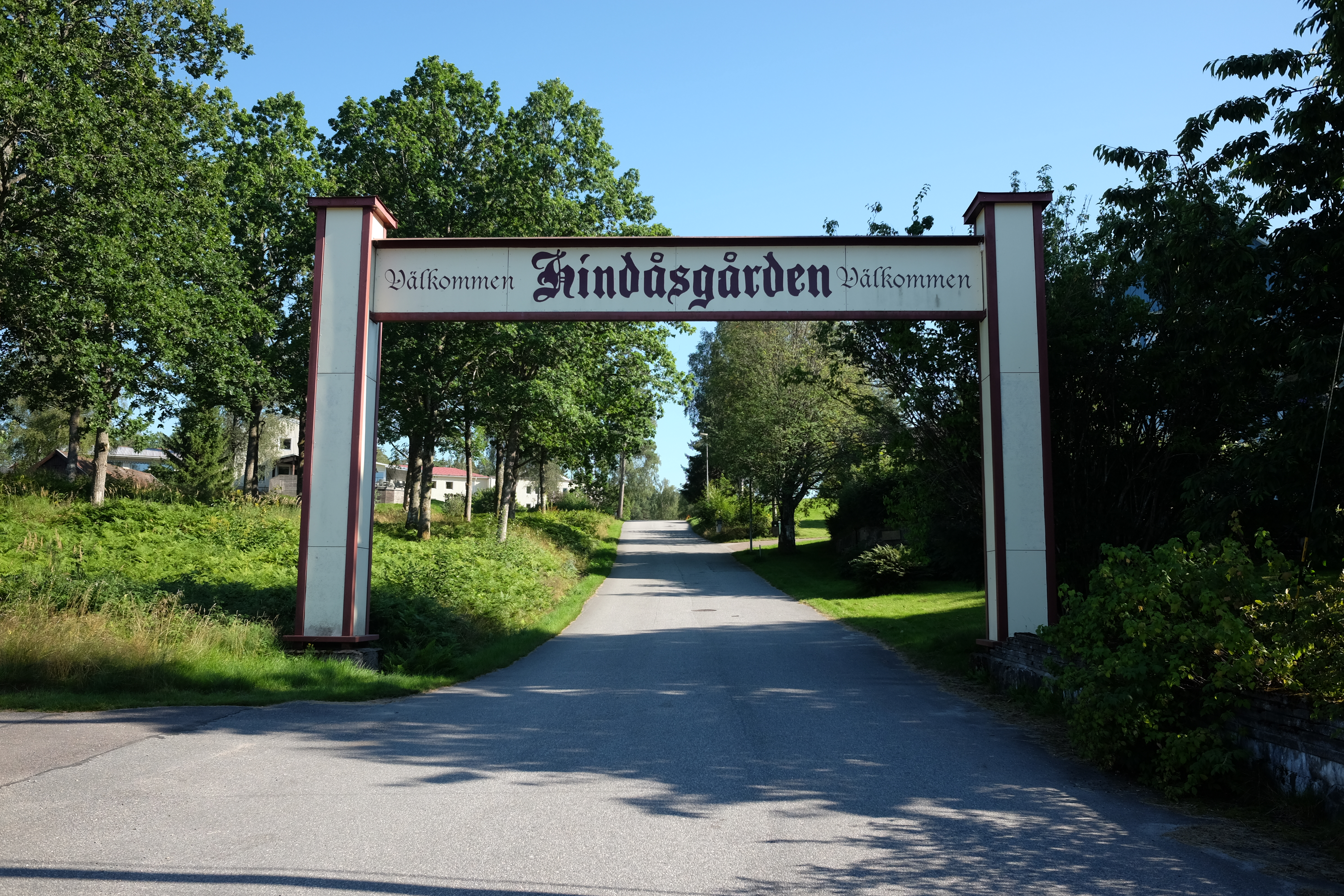 Hindås, Härryda kommun.